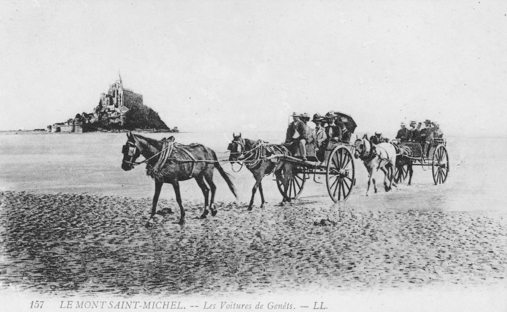 Maringotte. Carte postale ancienne.